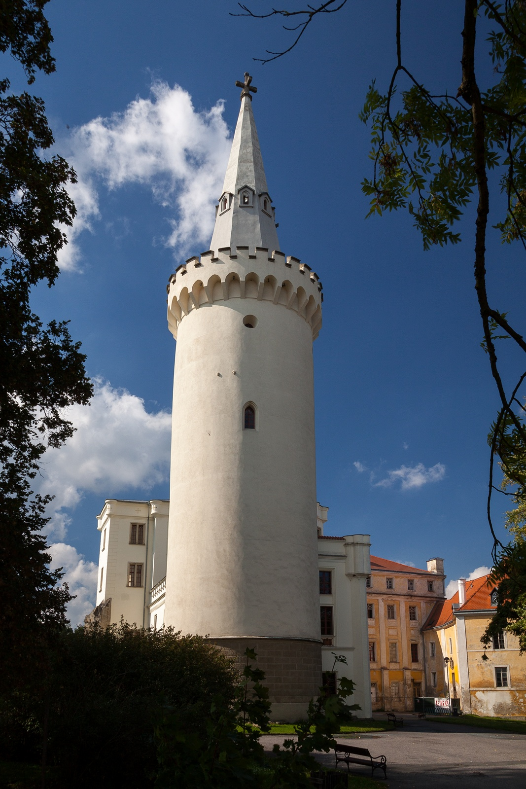 Zámek v Boru u Tachova, Bor 259